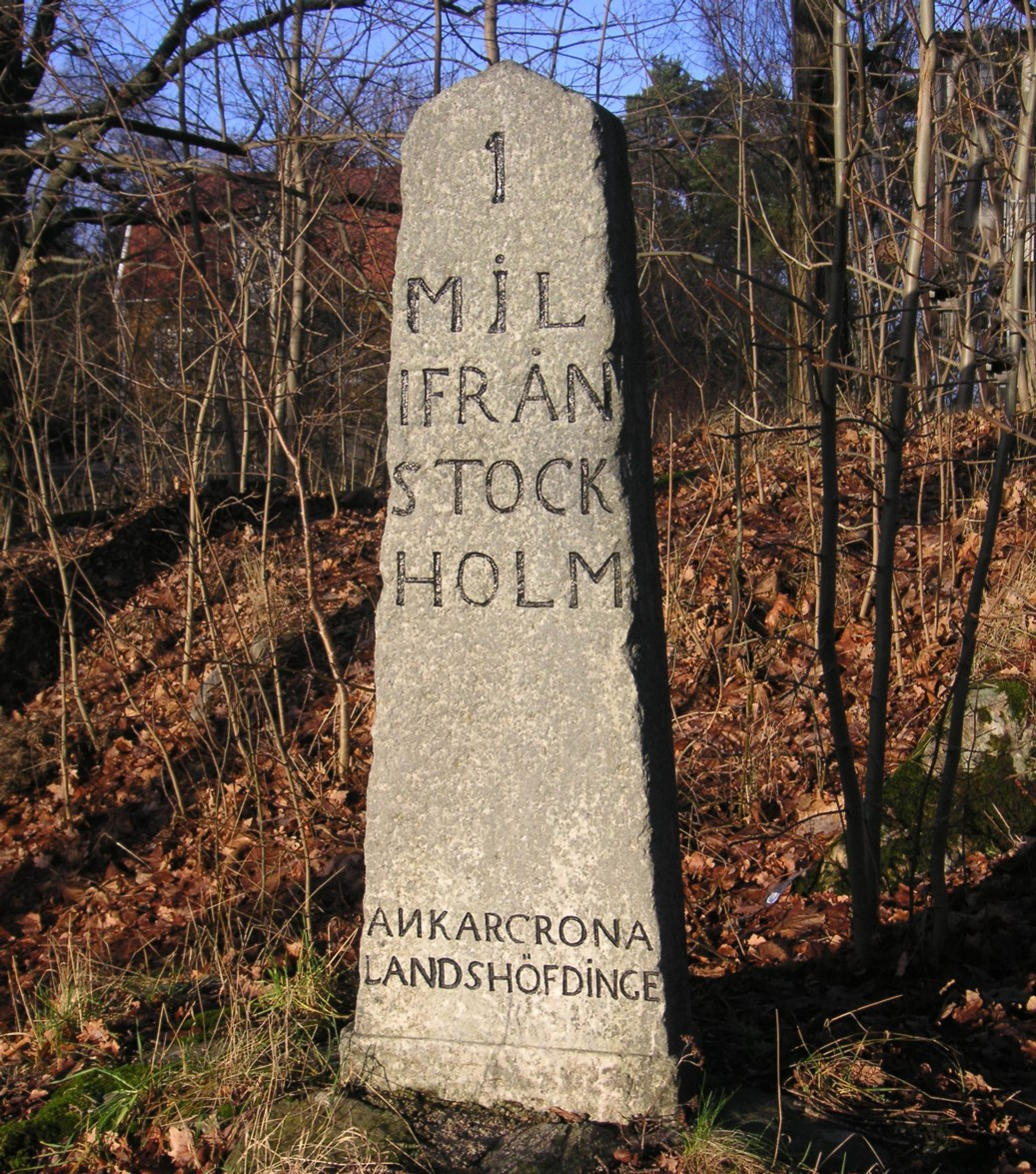 Milsten vid Gamla Södertäljevägen i Huddinge.